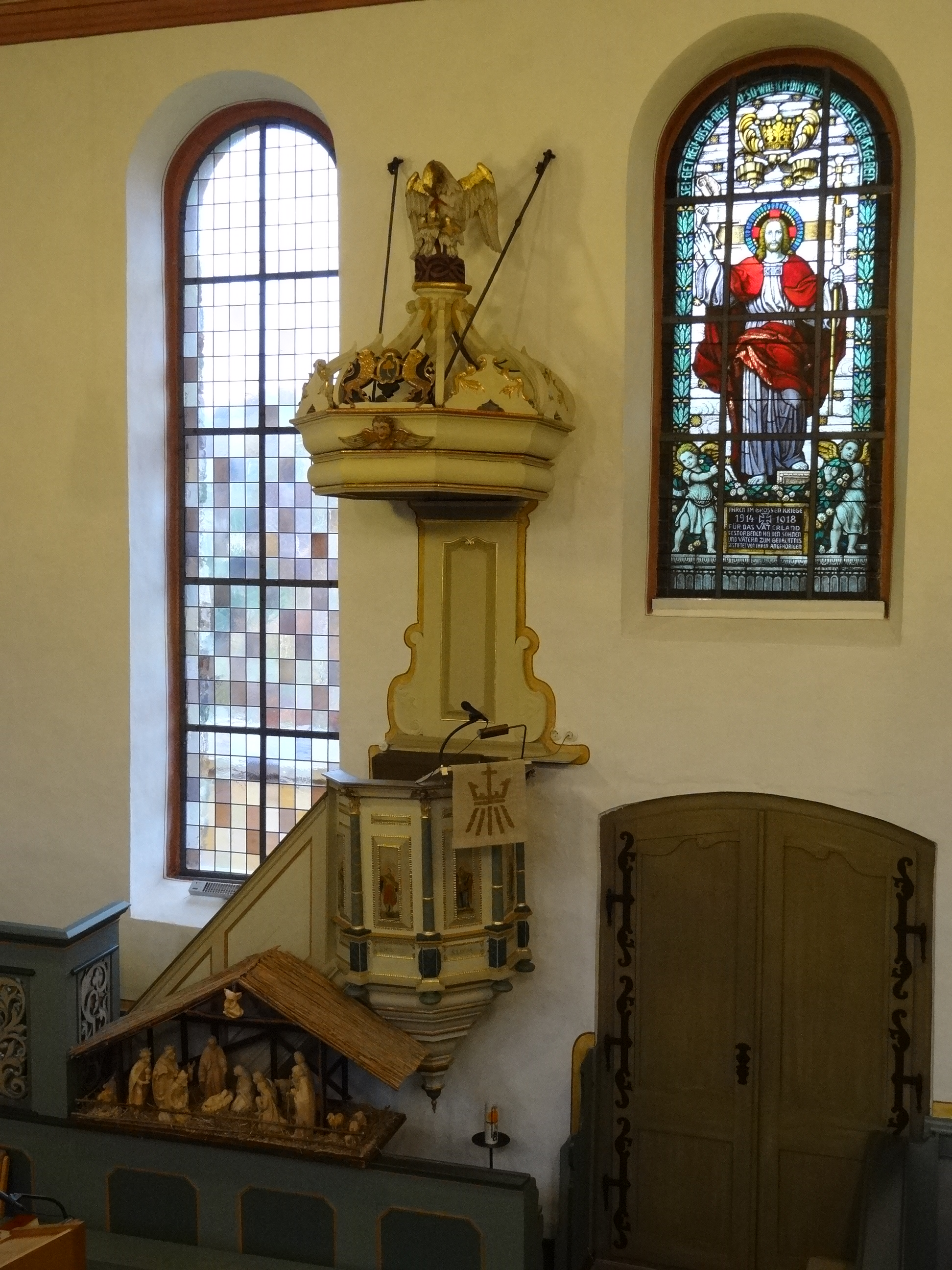 St. Michaelis Oberkleen